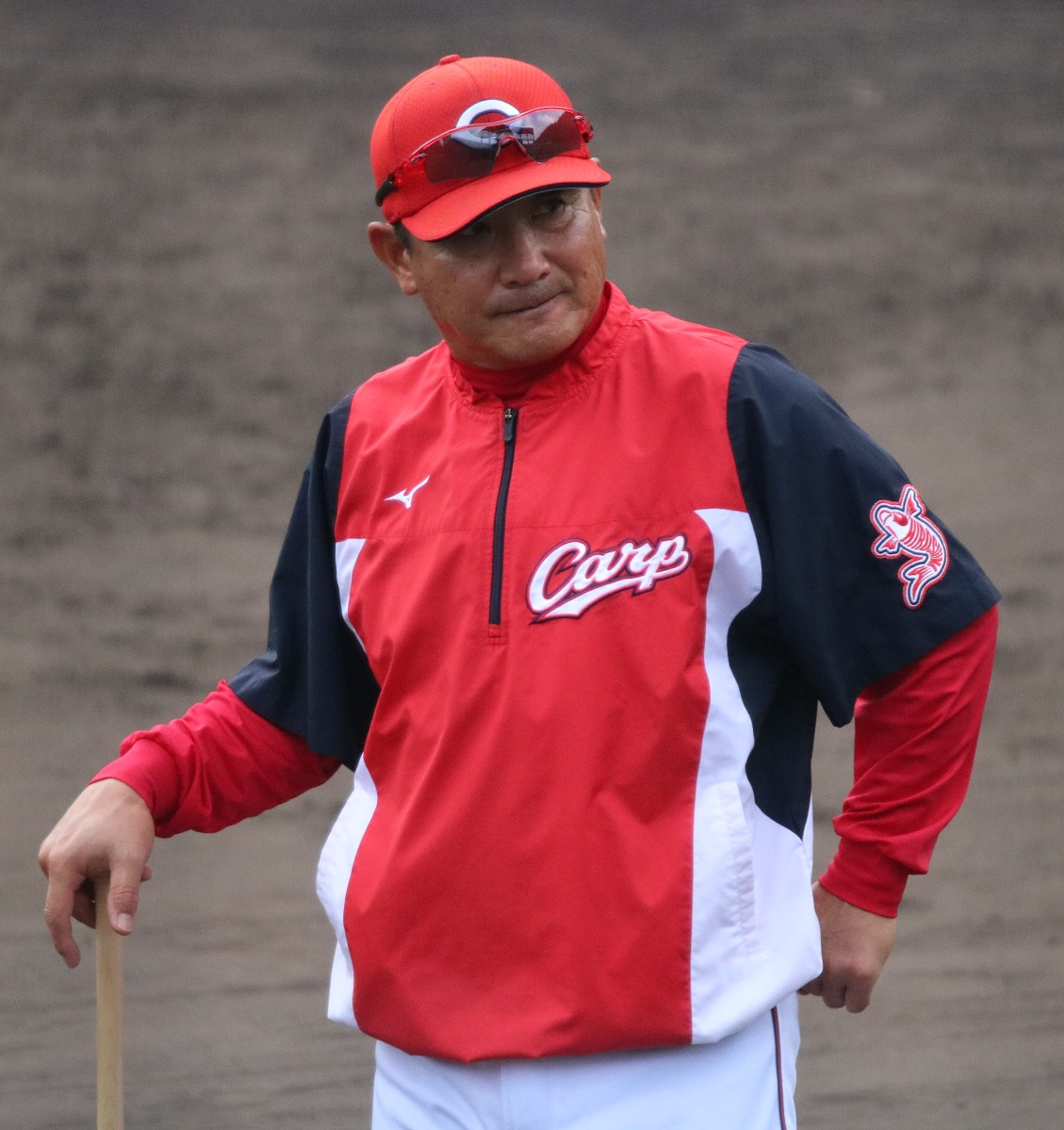 2017/11/10 天福球場